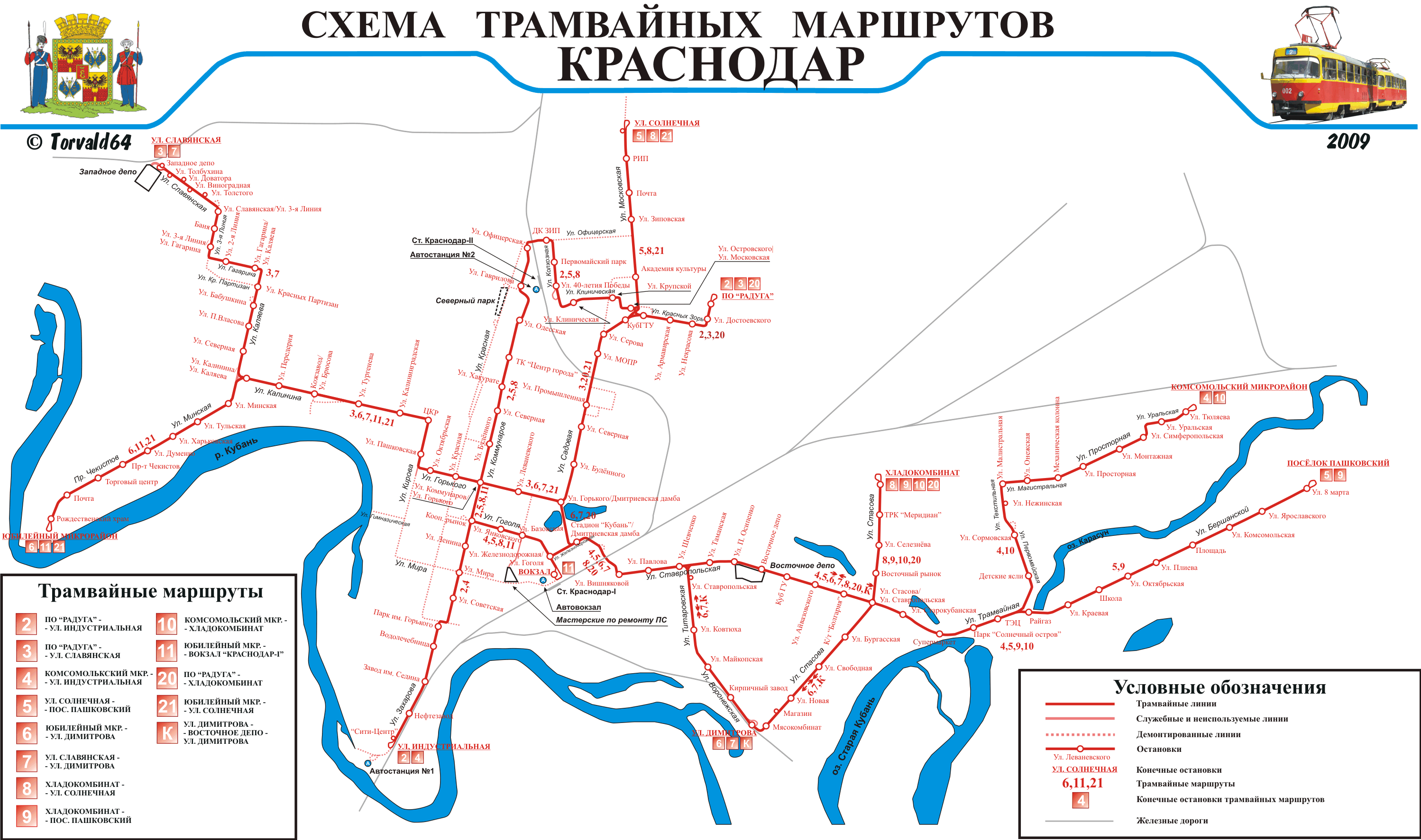 Схема трамвайных линий города Краснодара